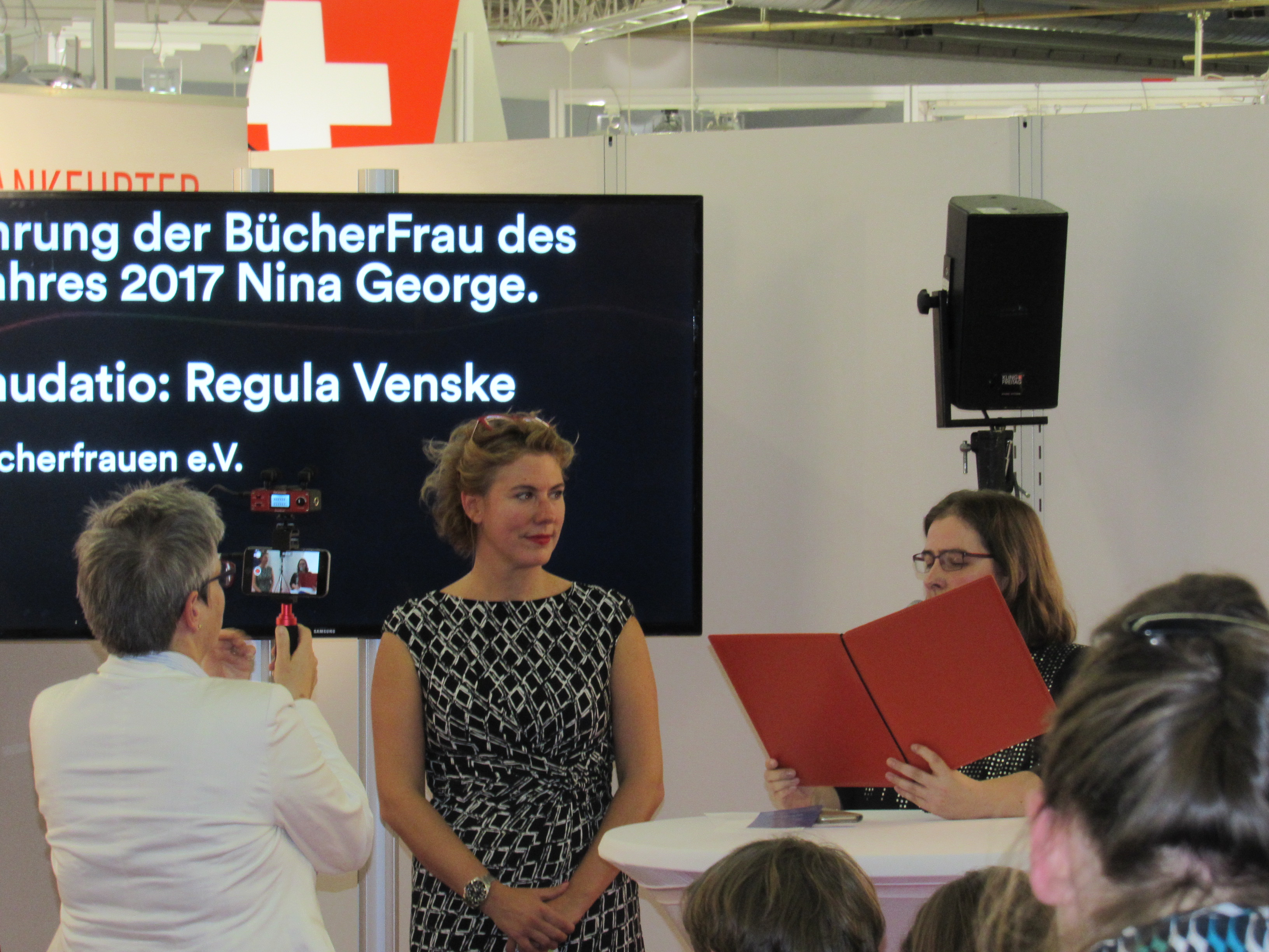 Nina George (* 30. August 1973 in Bielefeld), deutsche Schriftstellerin und Journalistin. The making of this document was supported by the Community-Budget of Wikimedia Germany.